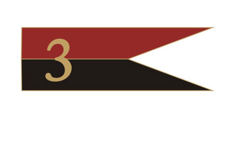 WZÓR GRAFICZNY PROPORCZYKA NA BERET 3. BATALIONU INŻYNIERYJNEGO